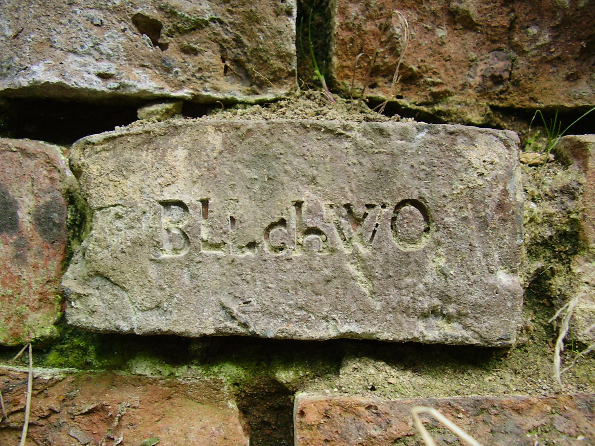 Stempel cegielni Bolechowo